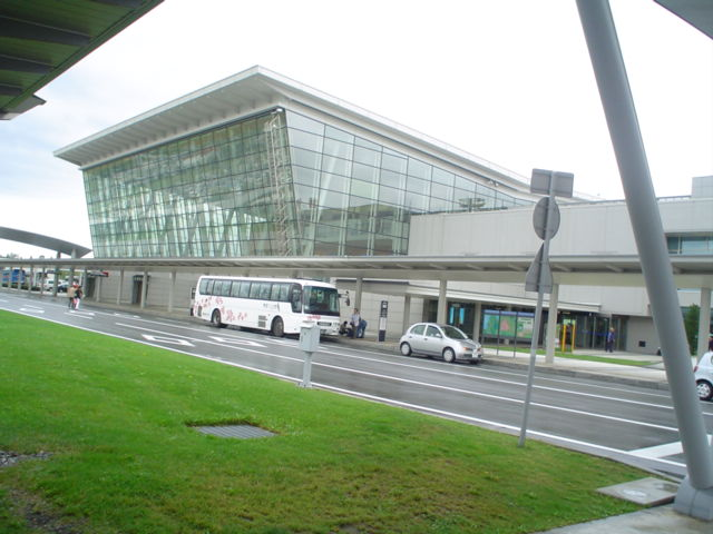 Asahikawa airport, Hokkaido, Japan Photographed by Tamago915 on 18 Sep 2005